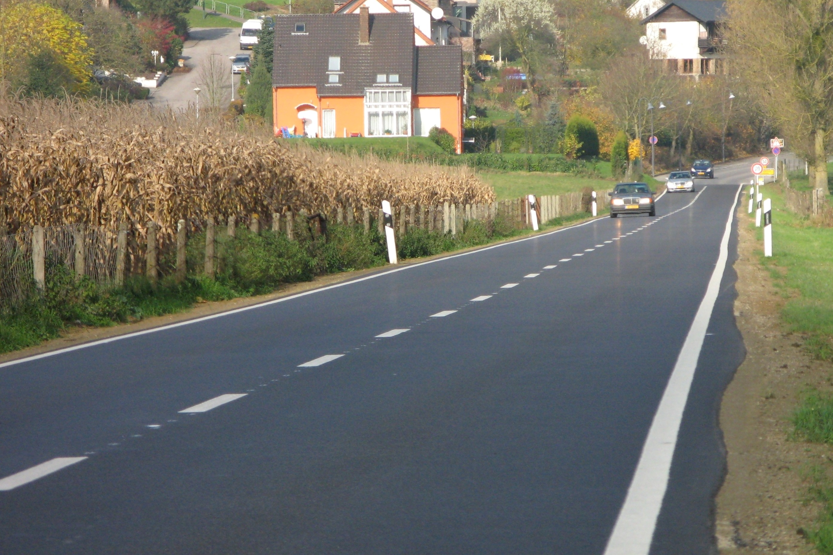 Den CR101 zu Schëndels. Kategorie:Chemin repris